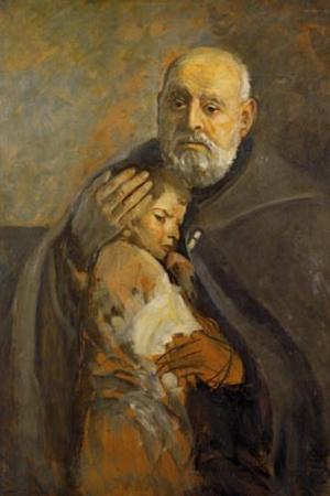 Portret św. Brata Alberta (Adam Chmielowski), 1934